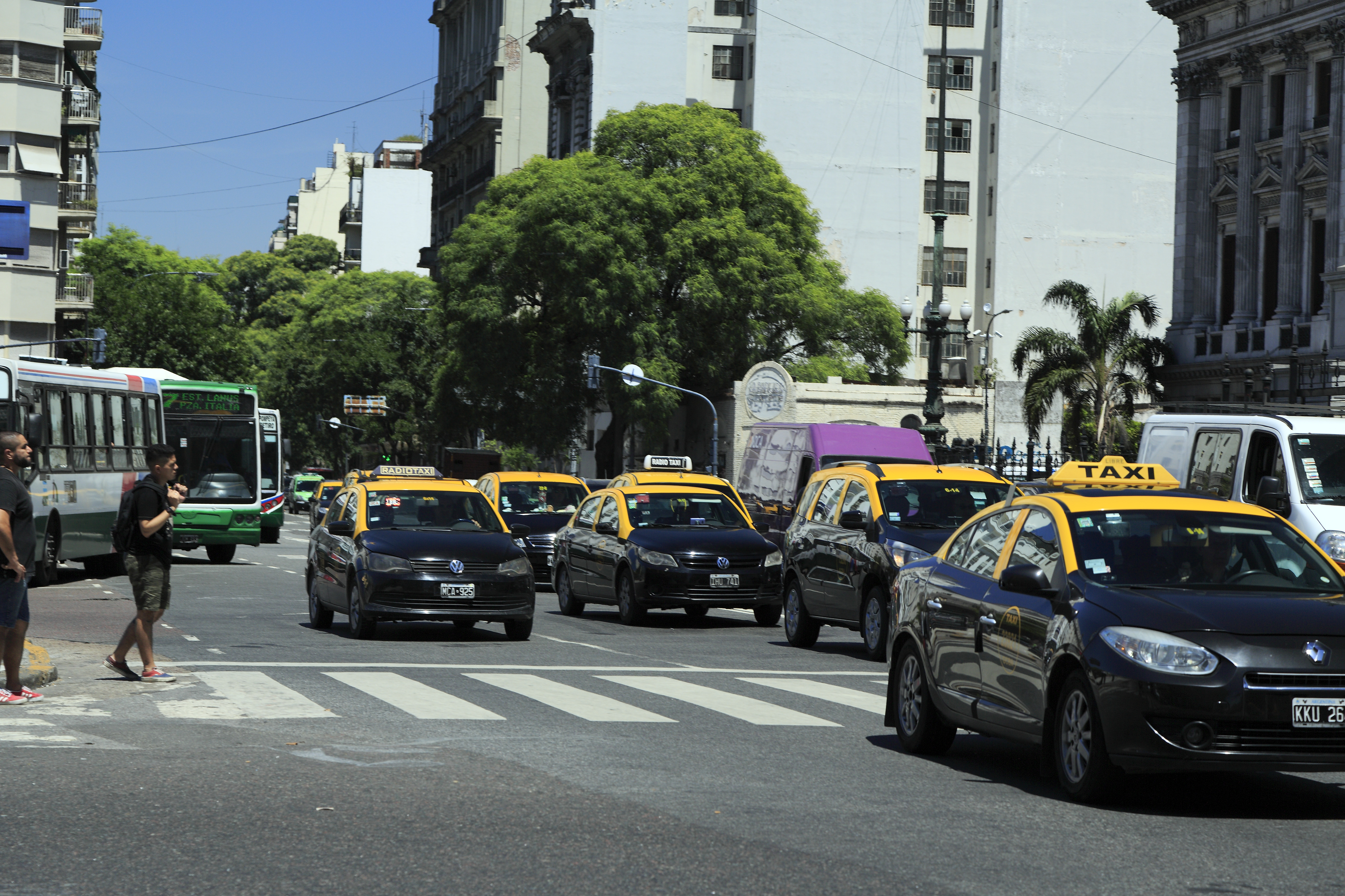 Wie die Taxiunternehmer und ihr Personal genug Geld verdienen, um davon leben zu können, bleibt ihr Geheimnis. Die Taxen sind allgegenwärtig (und erinnern mit dem Anstrich an Barcelona)